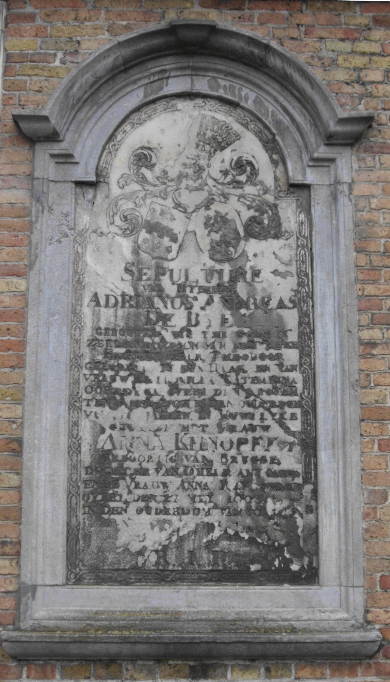 De familie van de schilder Fernand Khnopff was van Oostenrijkse afkomst, maar reeds in de 18de eeuw in Brugge gevestigd. De foto toont een (zeer verweerde) gedenkplaat van Anna Khnopff (1736-1807) en haar echtgenoot, aangebracht in de zuidgevel van de Onze-Lieve-Vrouwekerk te Brugge.